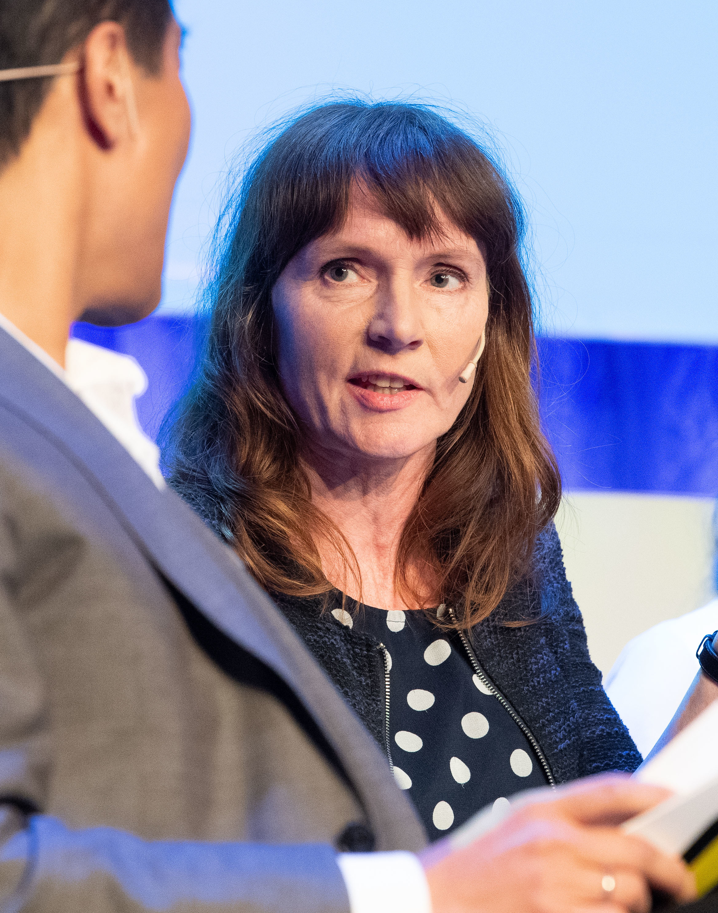 Aarebrotsamtalen